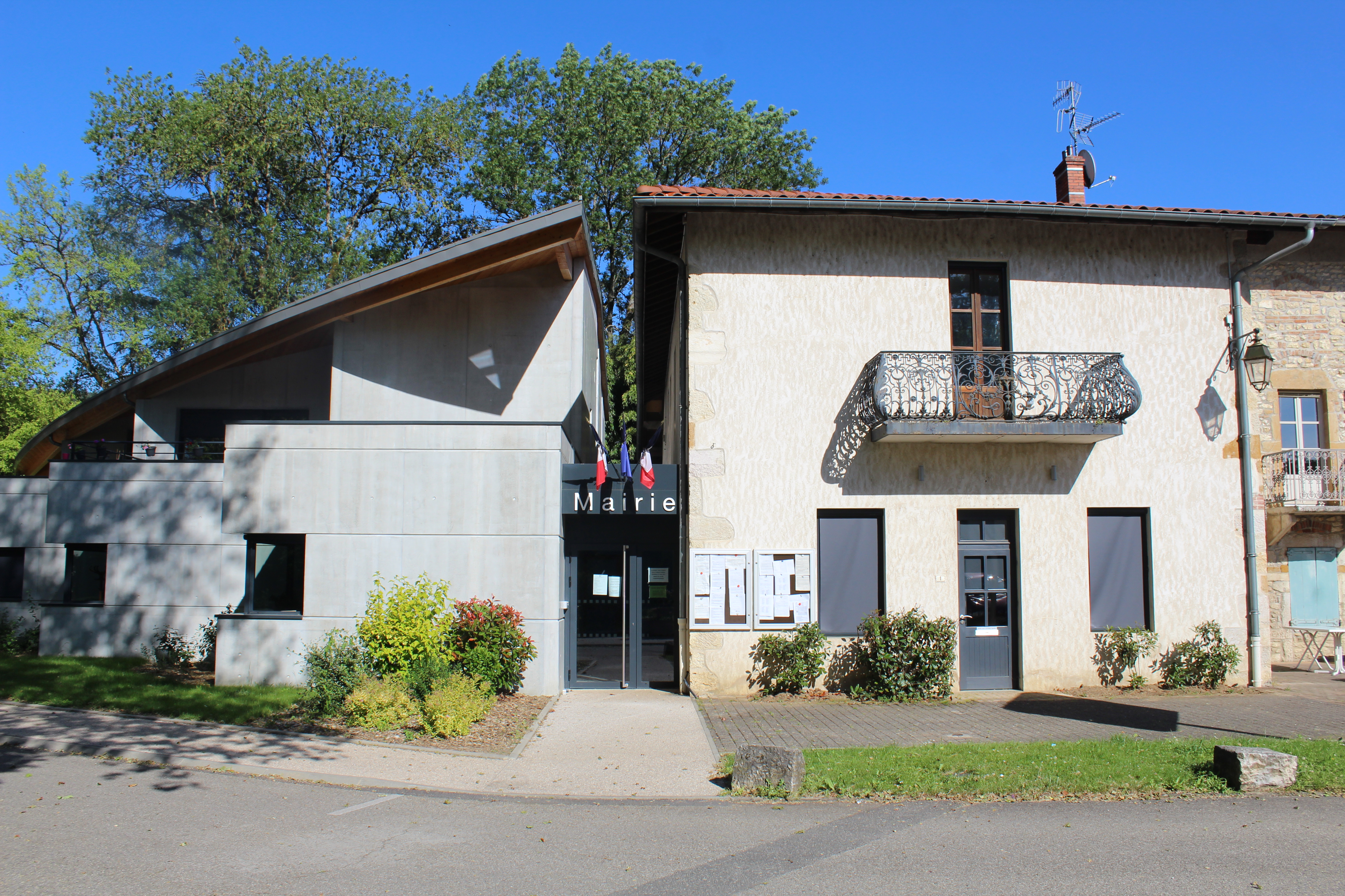 Mairie de Meillonnas.